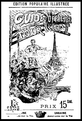 Couverture du Guide officiel de la tour Eiffel. Guide de 1893 dans le domaine public.